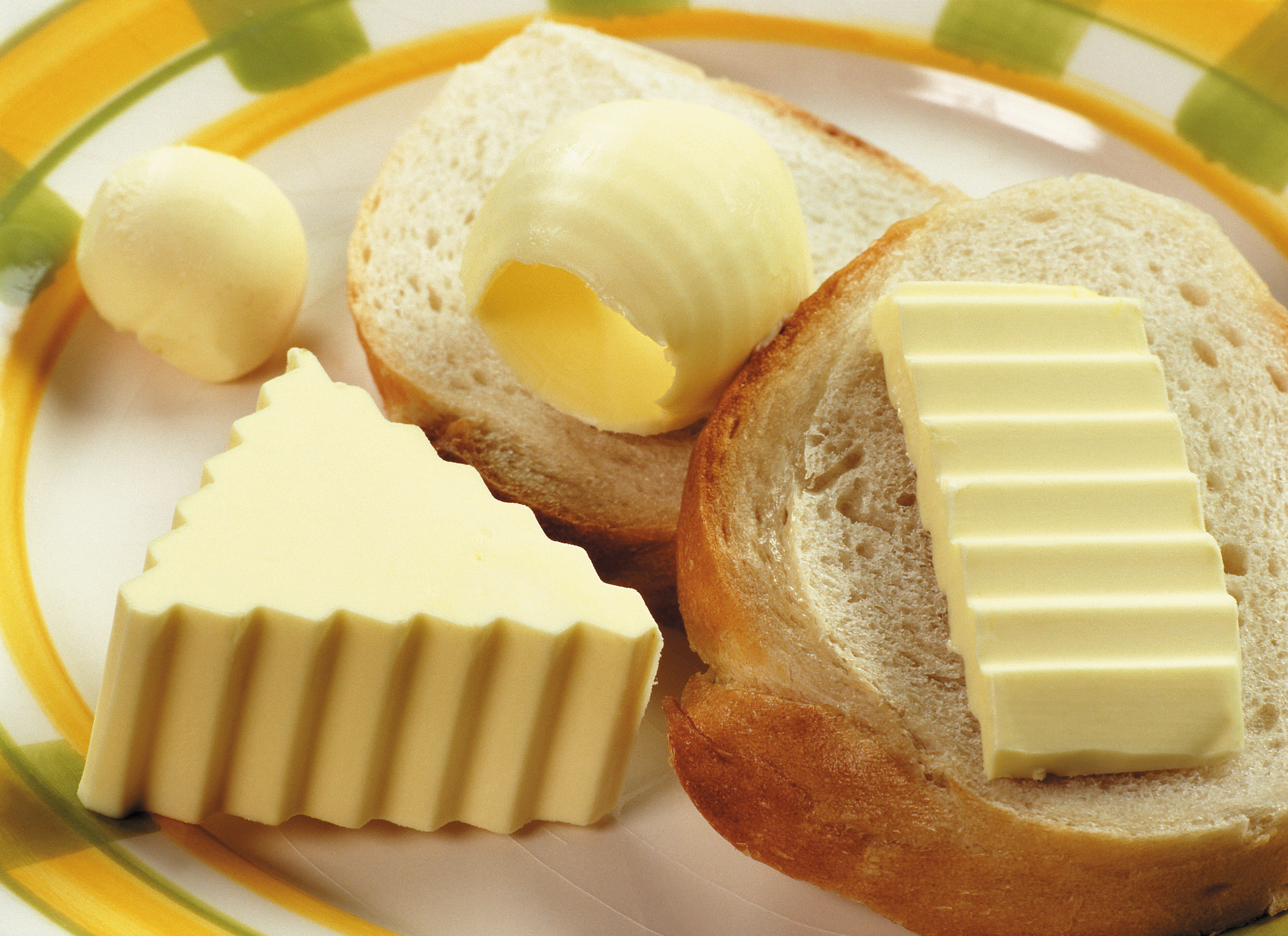 Սփրեդը հարմար է օգտագործել ինչպես տաք ուտեստների հետ, այնպես էլ ուղղակի քսել հացին: Այն հեշտ է քսվում, ինչից էլ հենց ստացել է իր անվանումը